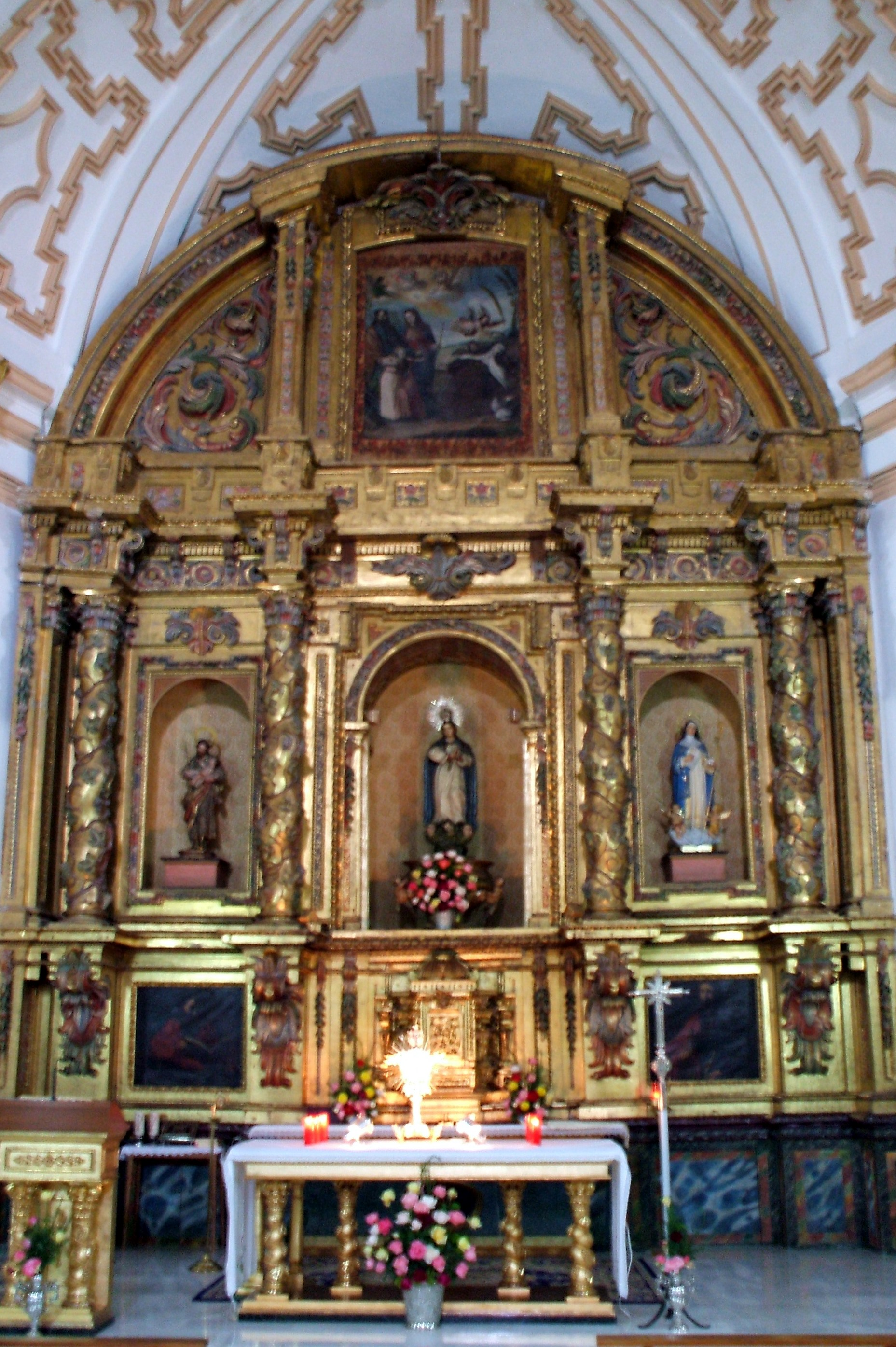 Altar mayor de la iglesia conventual de la Concepción, de Cuéllar